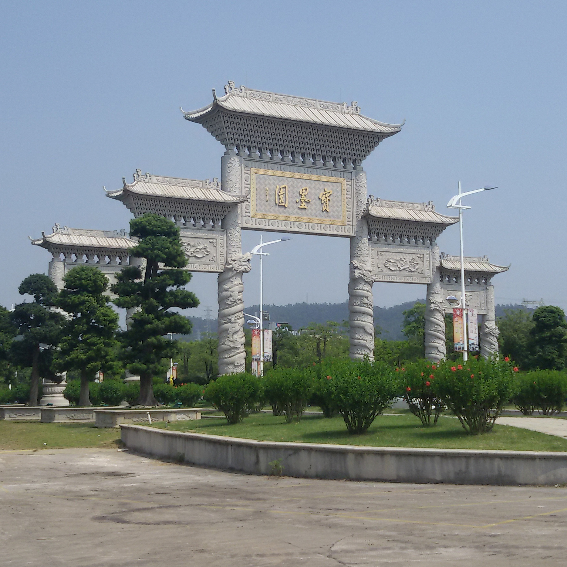 粵語: 寶墨園嘅正門